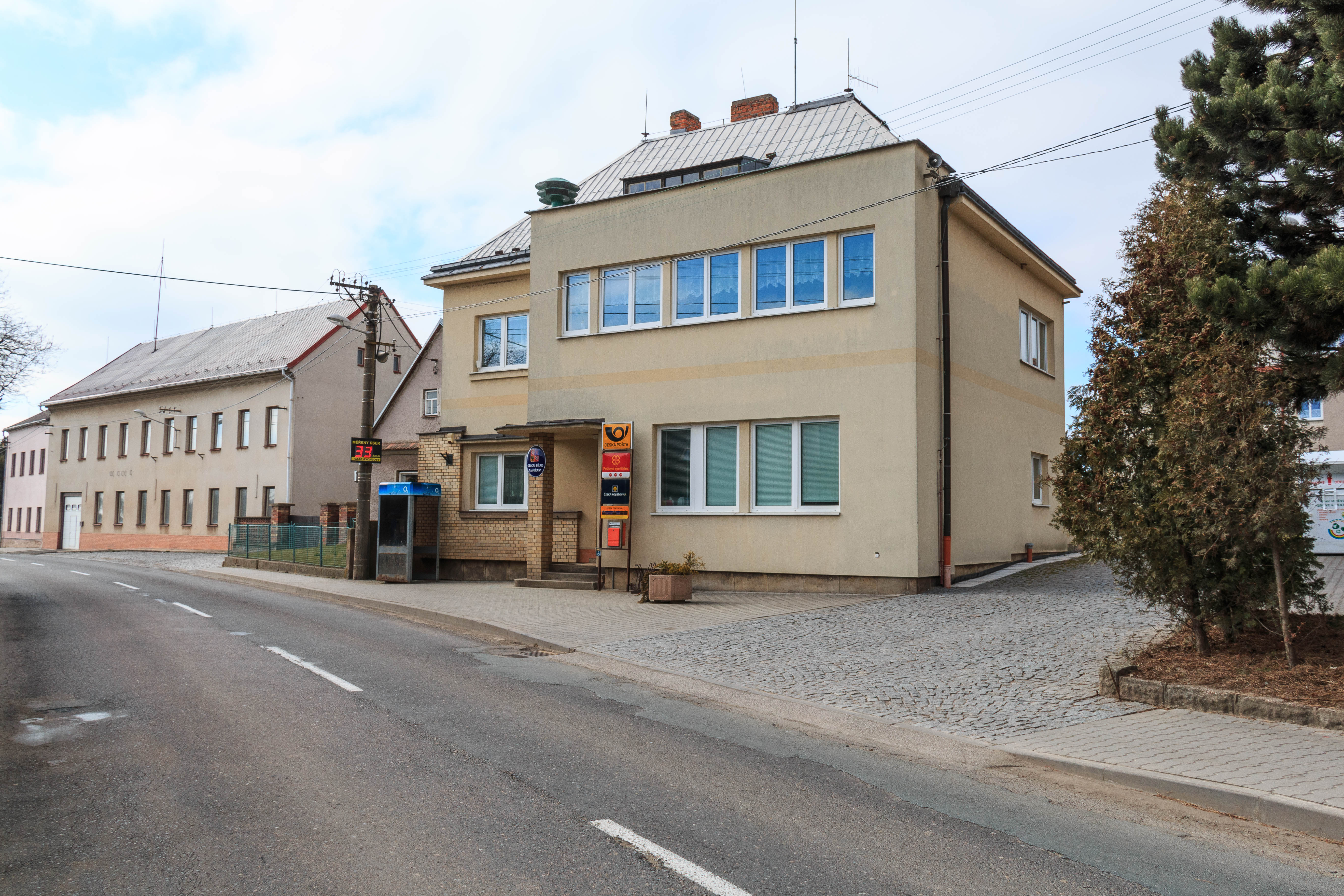 Nahořany obecní úřad